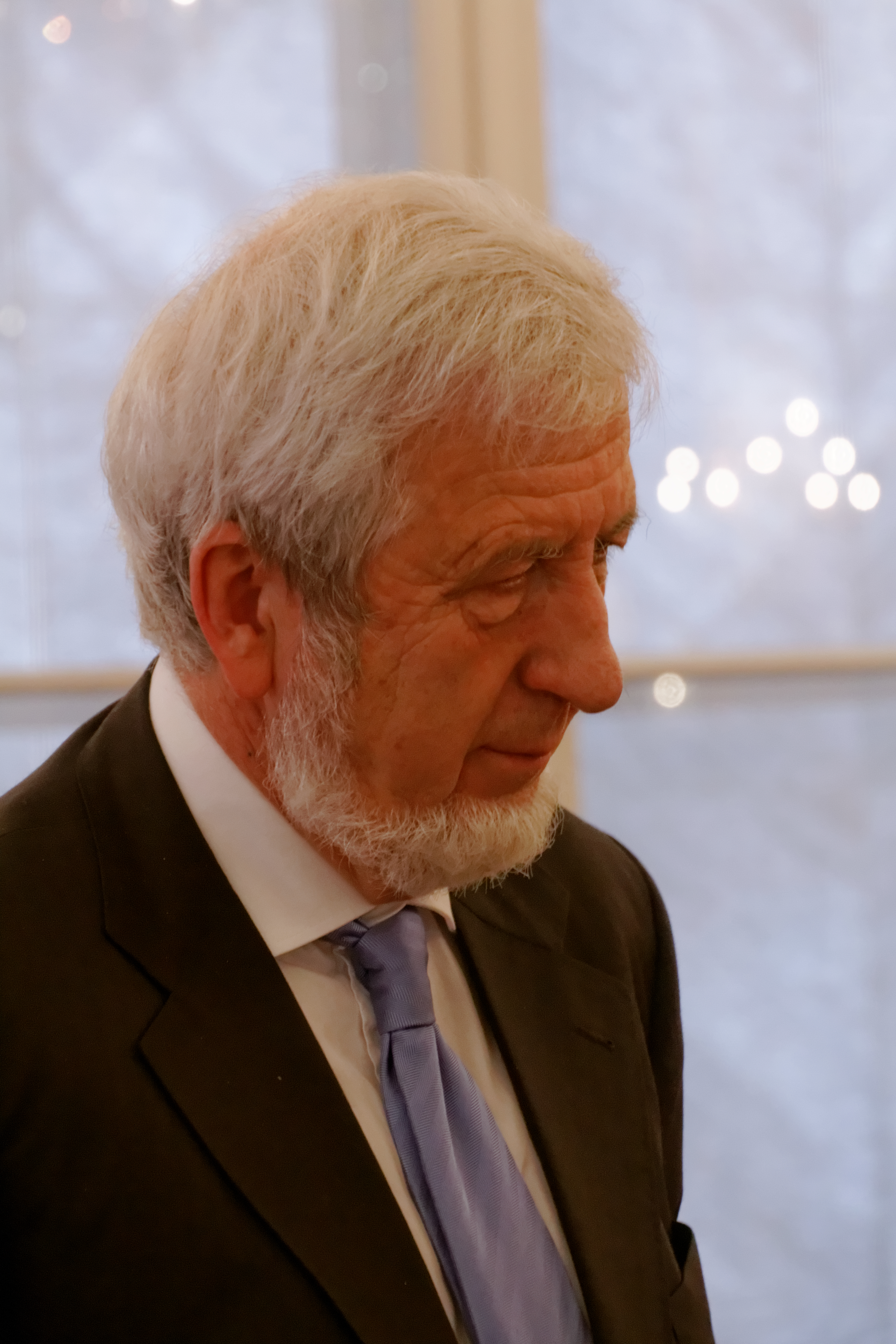 Geza Jeszenszky beim Internationalen Kolloquium der Adalbert-Stiftung Krefeld in der Andrassy-Universität Budapest